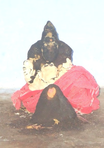 காட்டுப்புத்தூரில் உள்ள அத்தனூர் அம்மன் கோவிலில் உள்ள பட்டவன் சிலை மற்றும் பதிவு